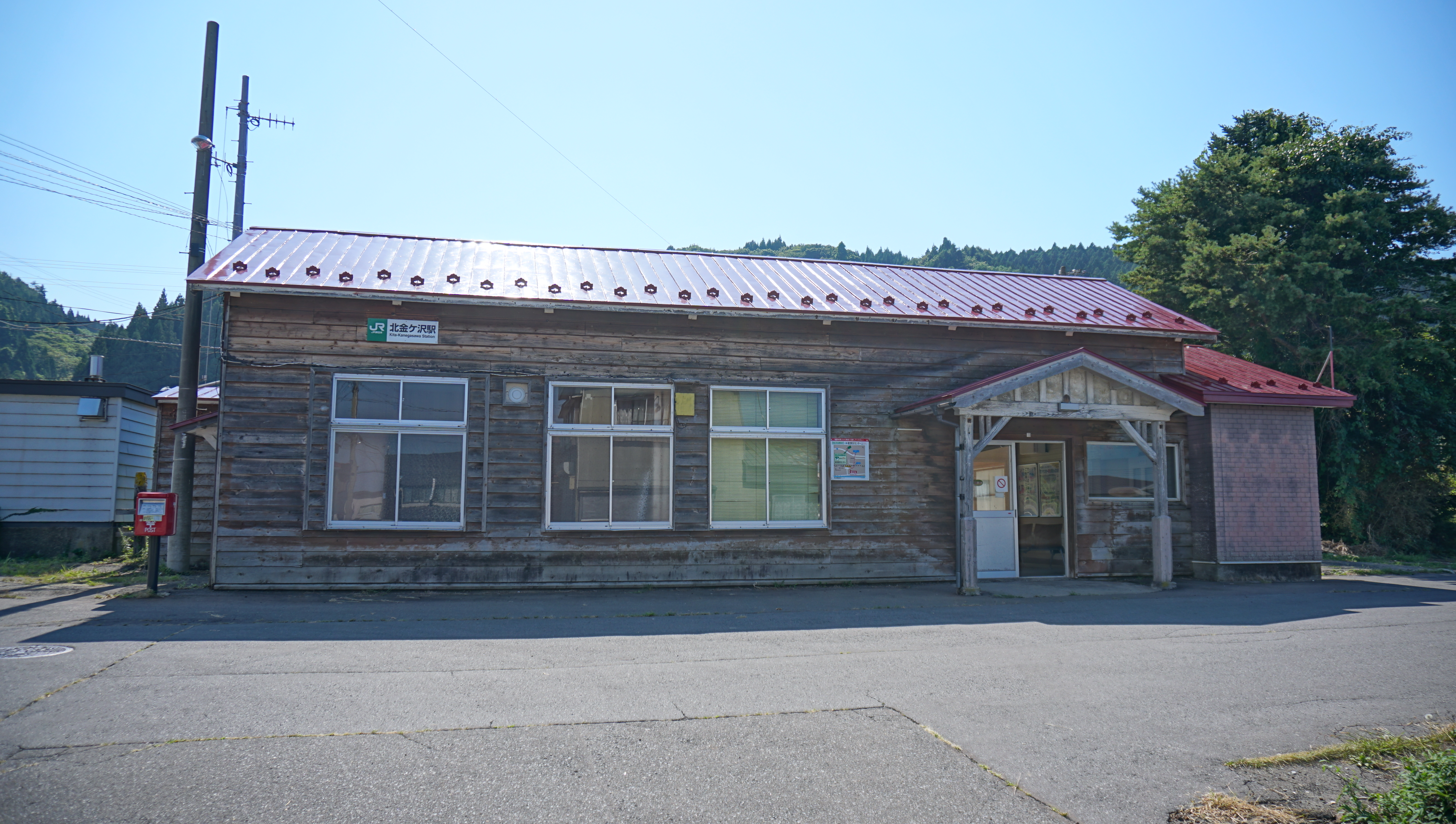 五能線 北金ヶ沢駅（青森県西津軽郡深浦町）